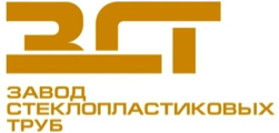 Логотип ООО НПП ЗСТ